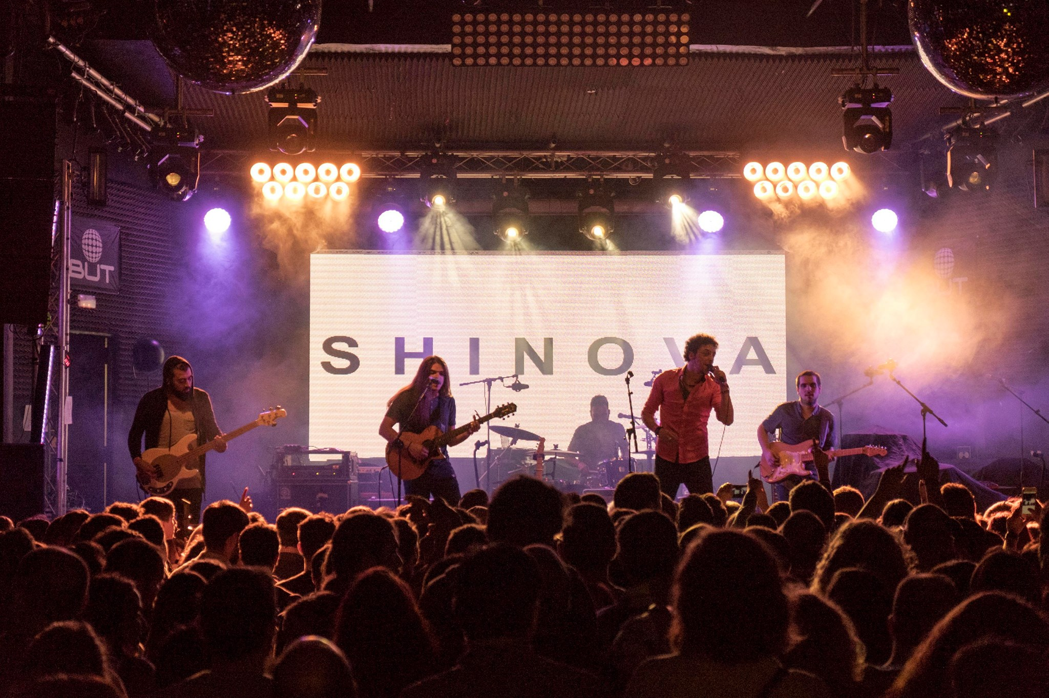 Shinova en ochoymedio club